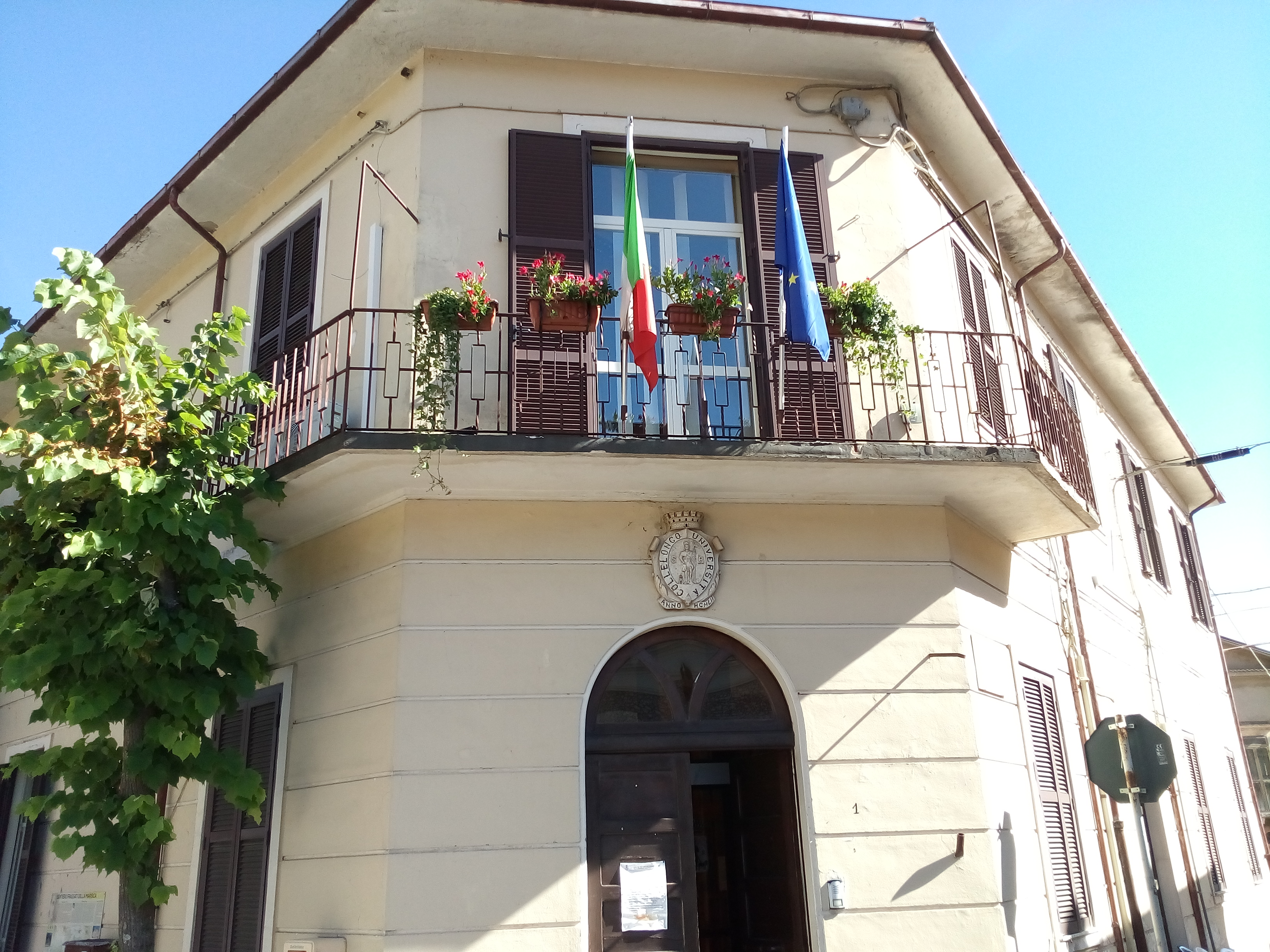 Municipio di Collelongo, Abruzzo